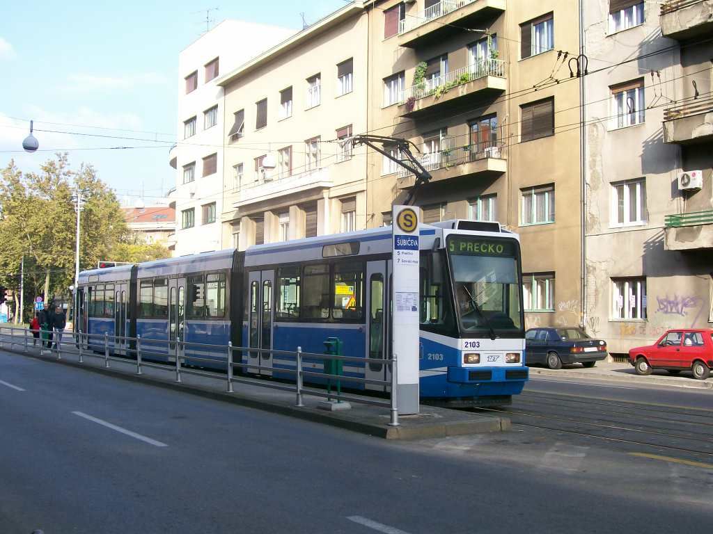 TMK 2100 ZET Zagreb